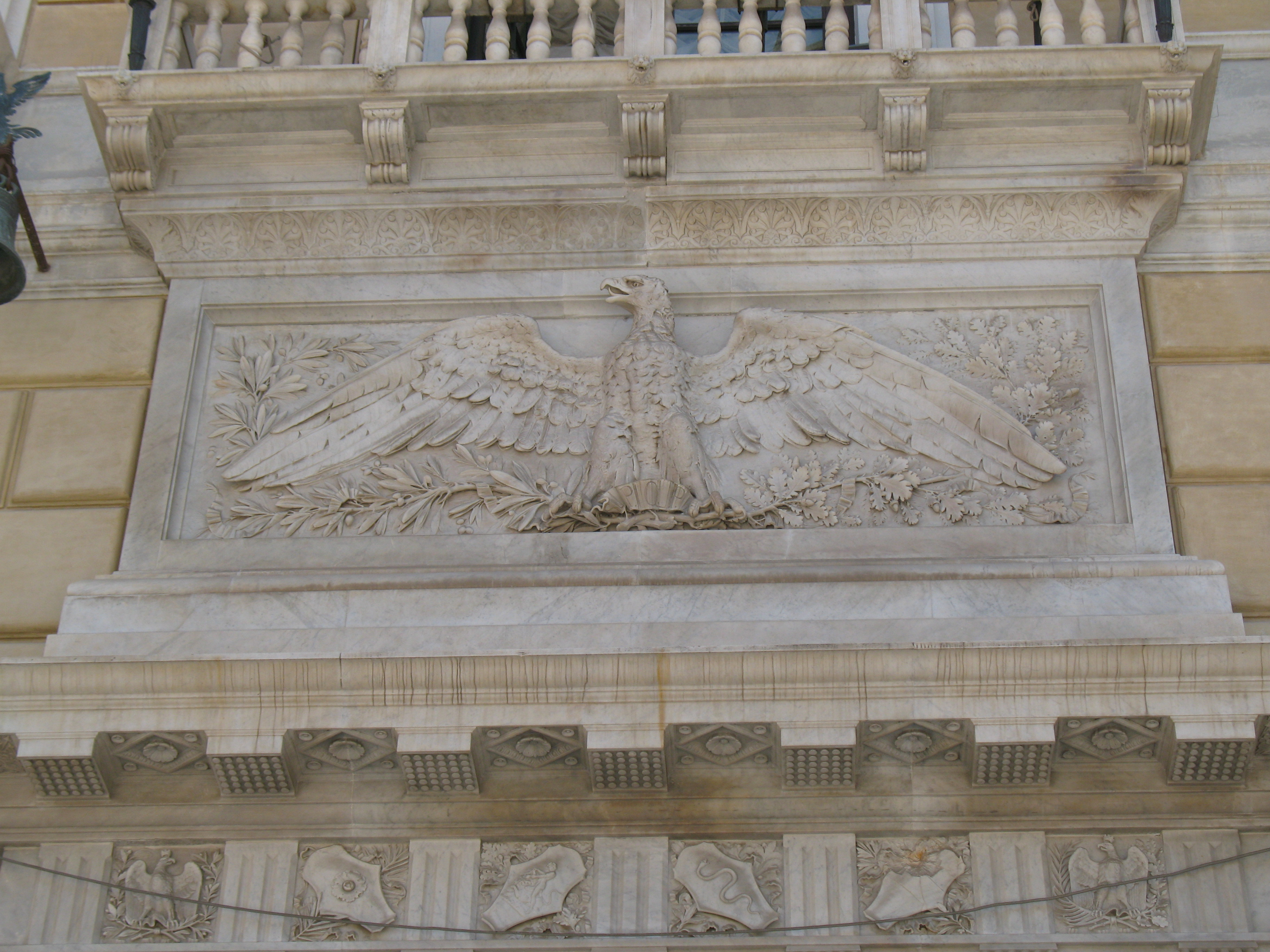 Palazzo Pretorio di Palermo, esterno, bassorilievo dell'aquila simbolo della città